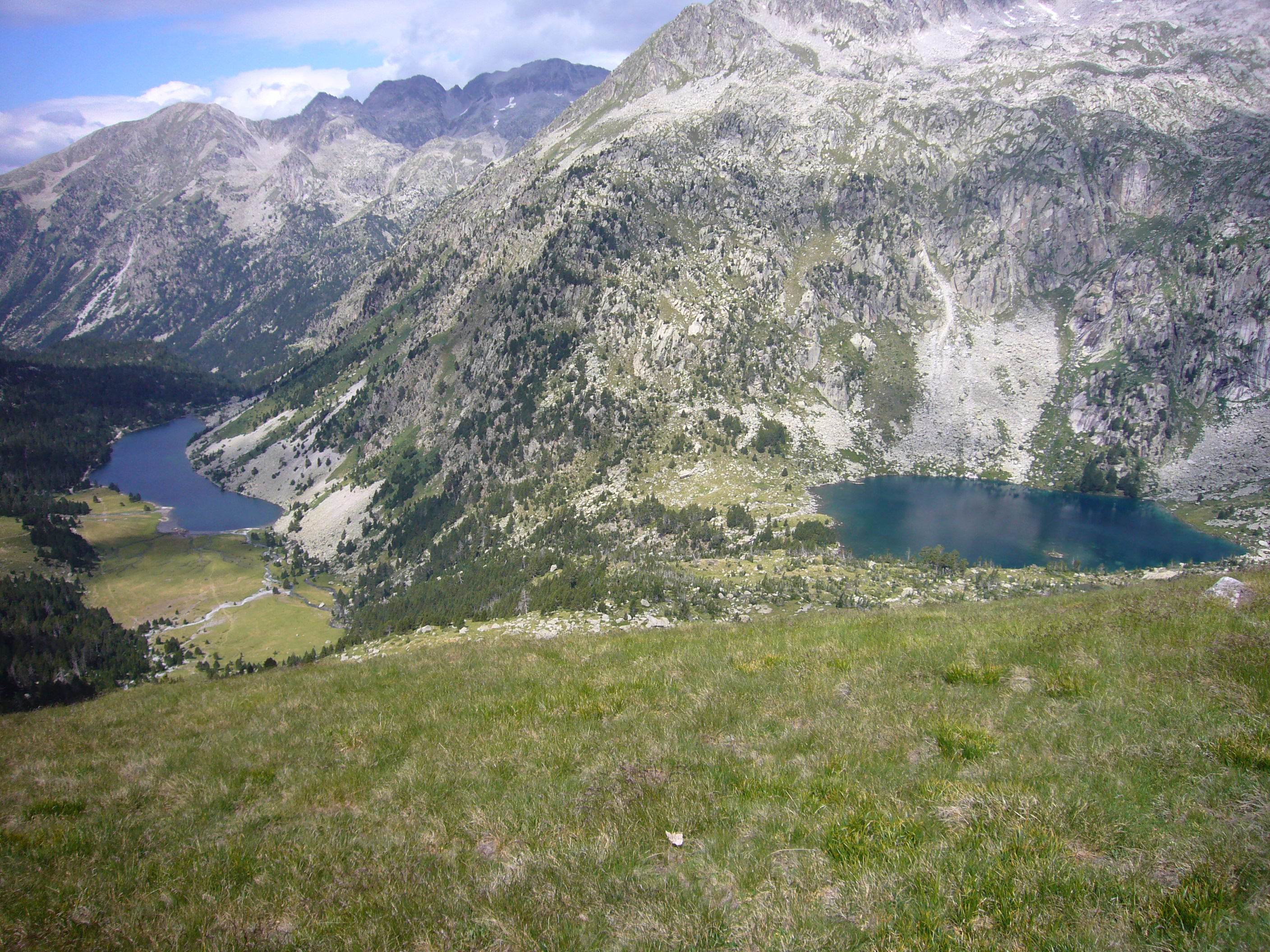 Estanys Llong (la Vall de Boí) i Redó (Colomers d'Espot); Espot, Pallars Sobirà, Catalunya